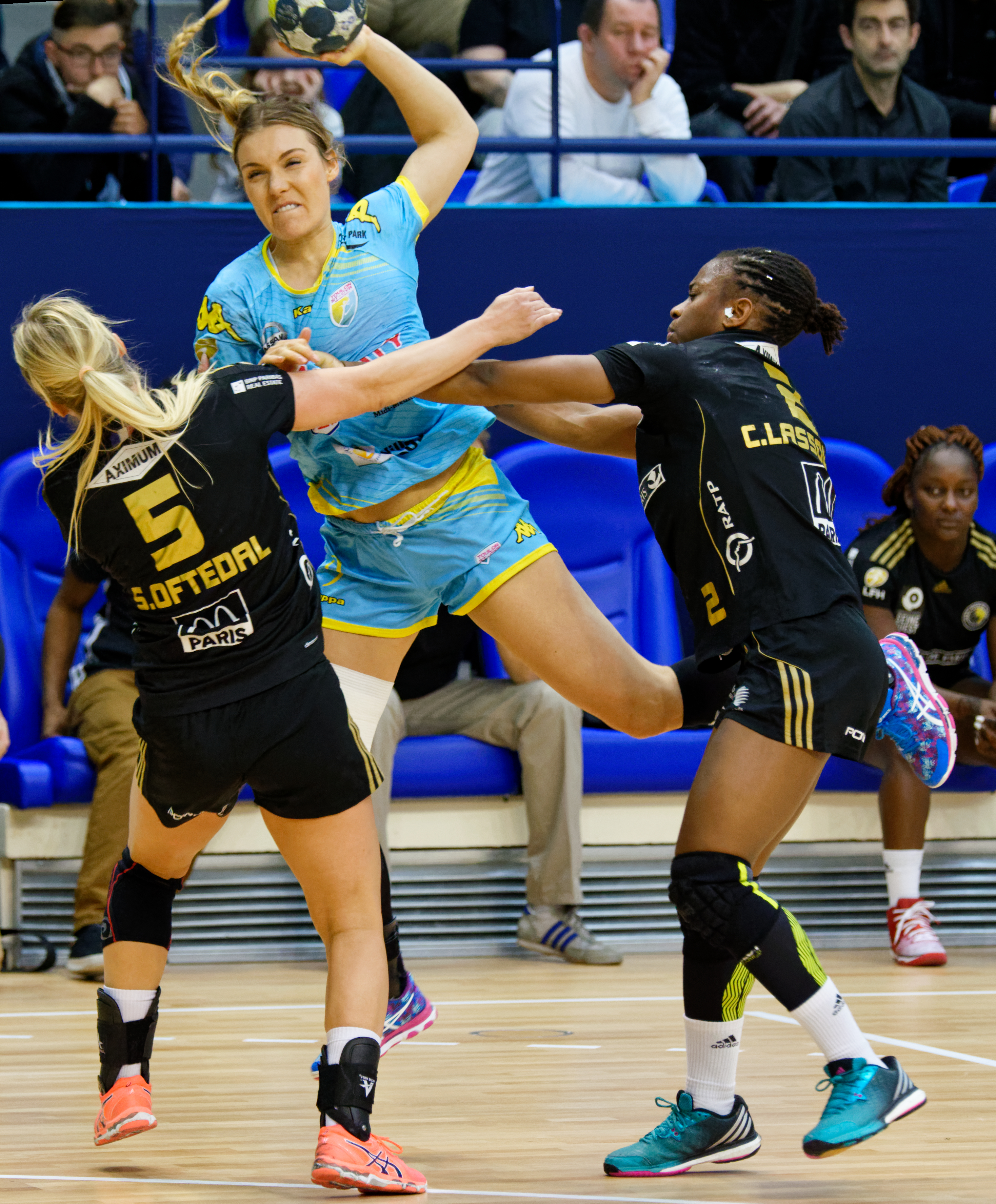 Rencontre de quart de finale retour des playoffs entre Issy Paris Hand et Toulon St Cyr. A Coubertin, le 7 mai 2017.